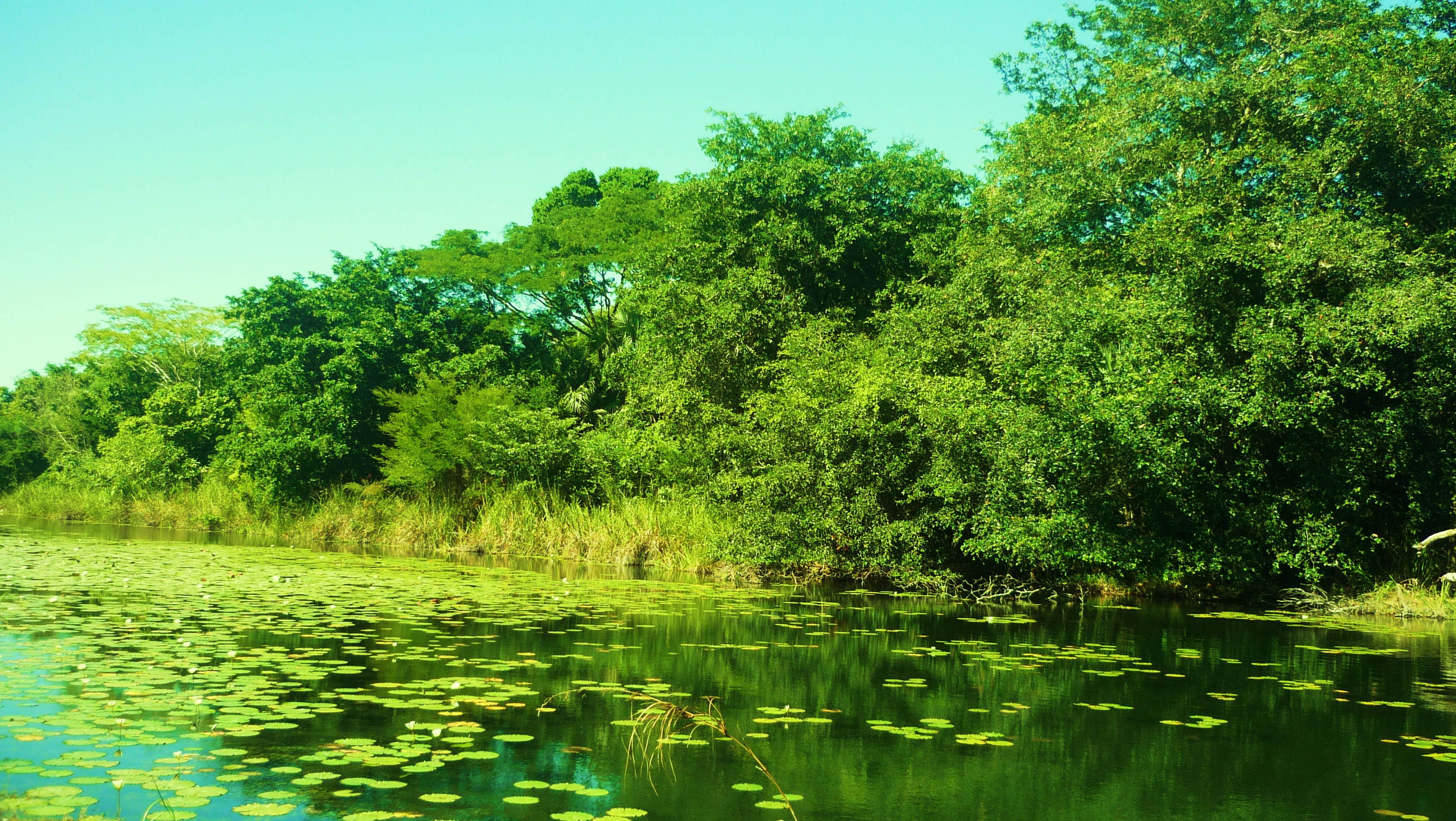 reserva de los petenes, campeche